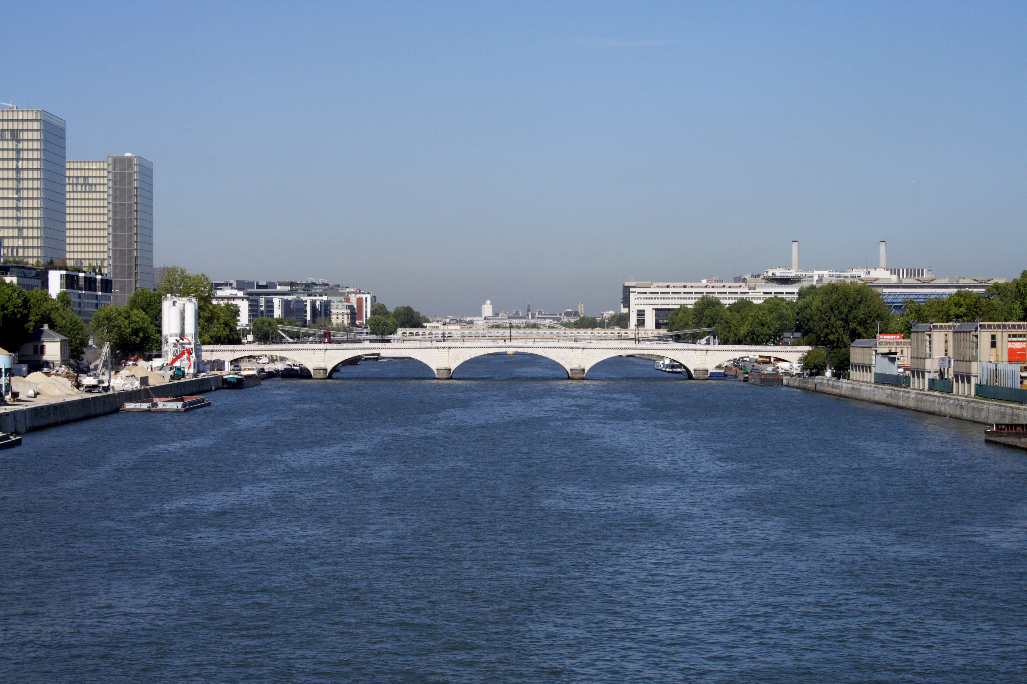 Pont de Tolbiac(Paris, France)